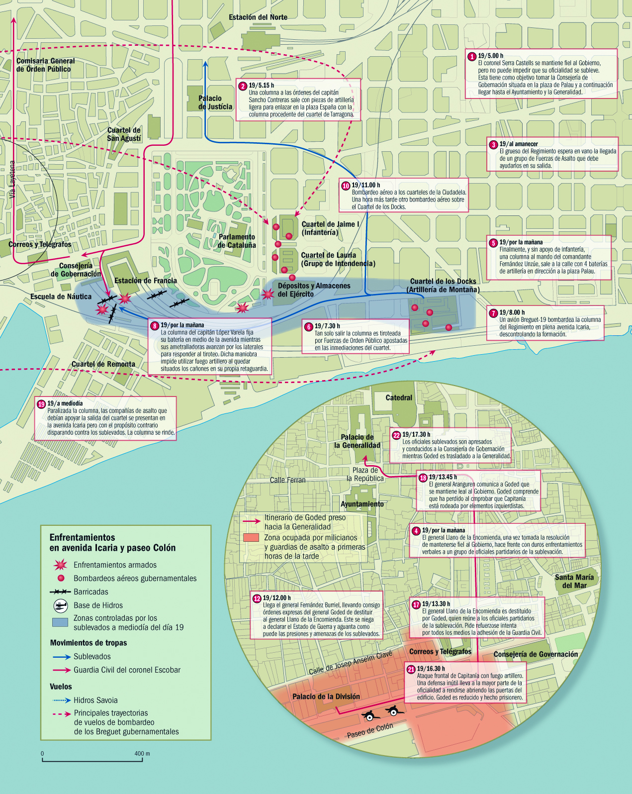 Infografía que narra los combates ocurridos en el frente marítimo de Barcelona el día 19 de julio de 1936. Página 57 del libro "La sublevación", de Víctor Hurtado (DAU, 2011). Segunda parte de un díptico.